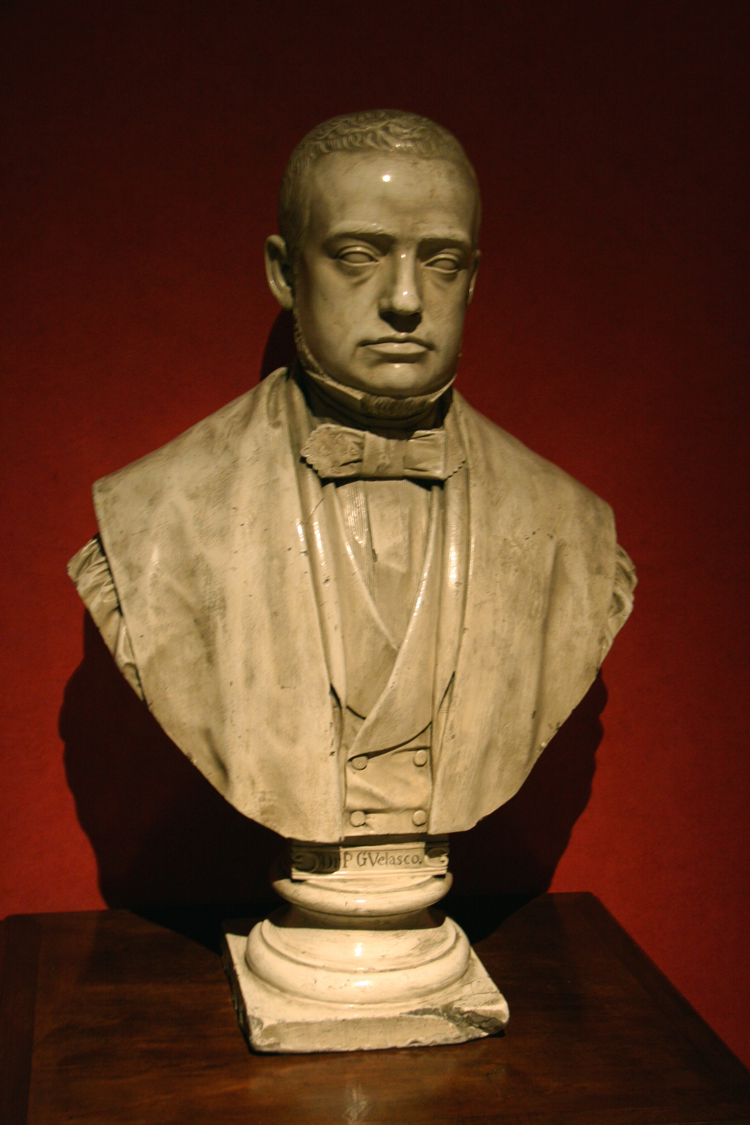 Pedro González de Velasco. (doctor Velasco)